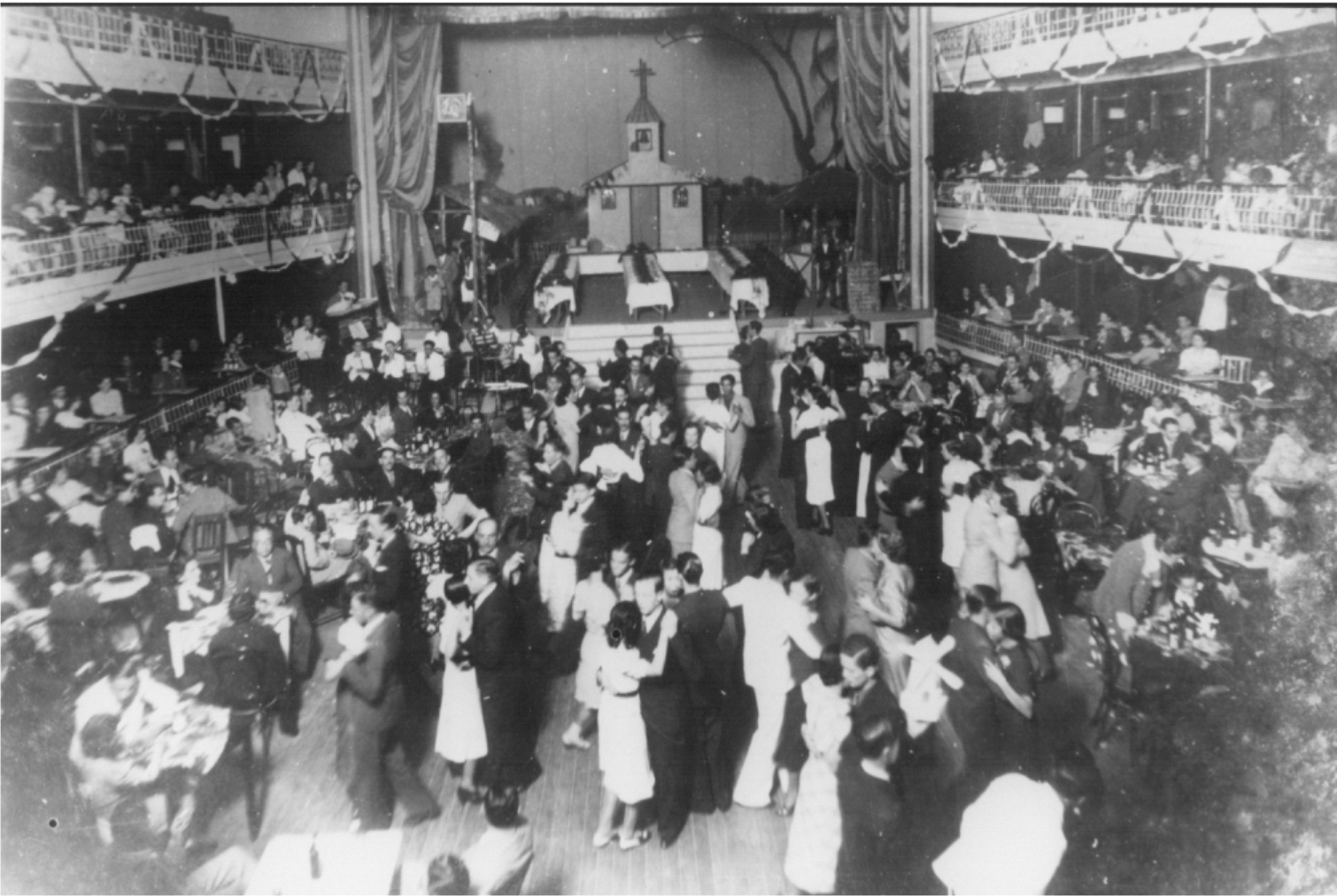 Festa Junina anos 30 - Teatro Municipal de São João da Boa Vista